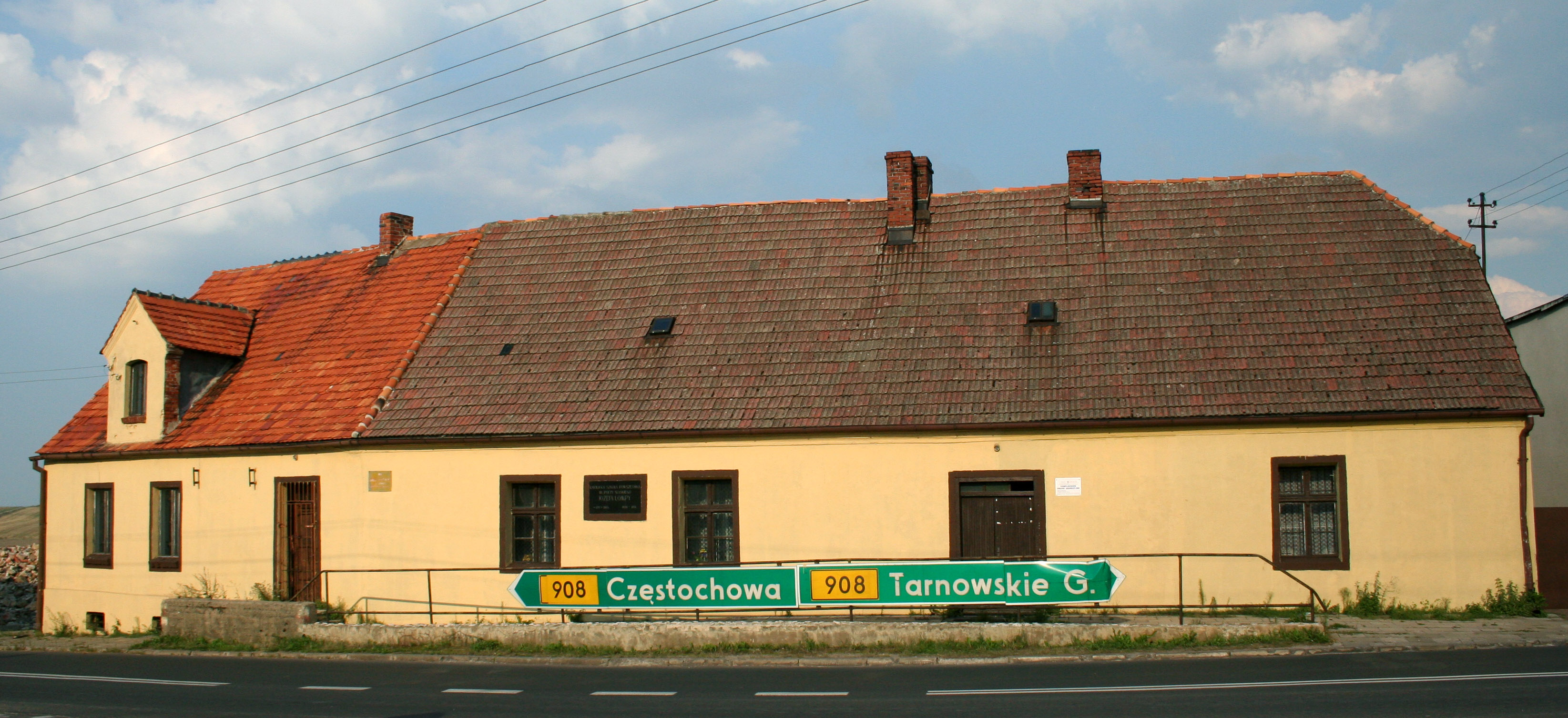 zabytkowy budynek dawnej szkoły w Lubszy, w której uczył Józej Lompa gmina Woźniki, powiat lubliniecki